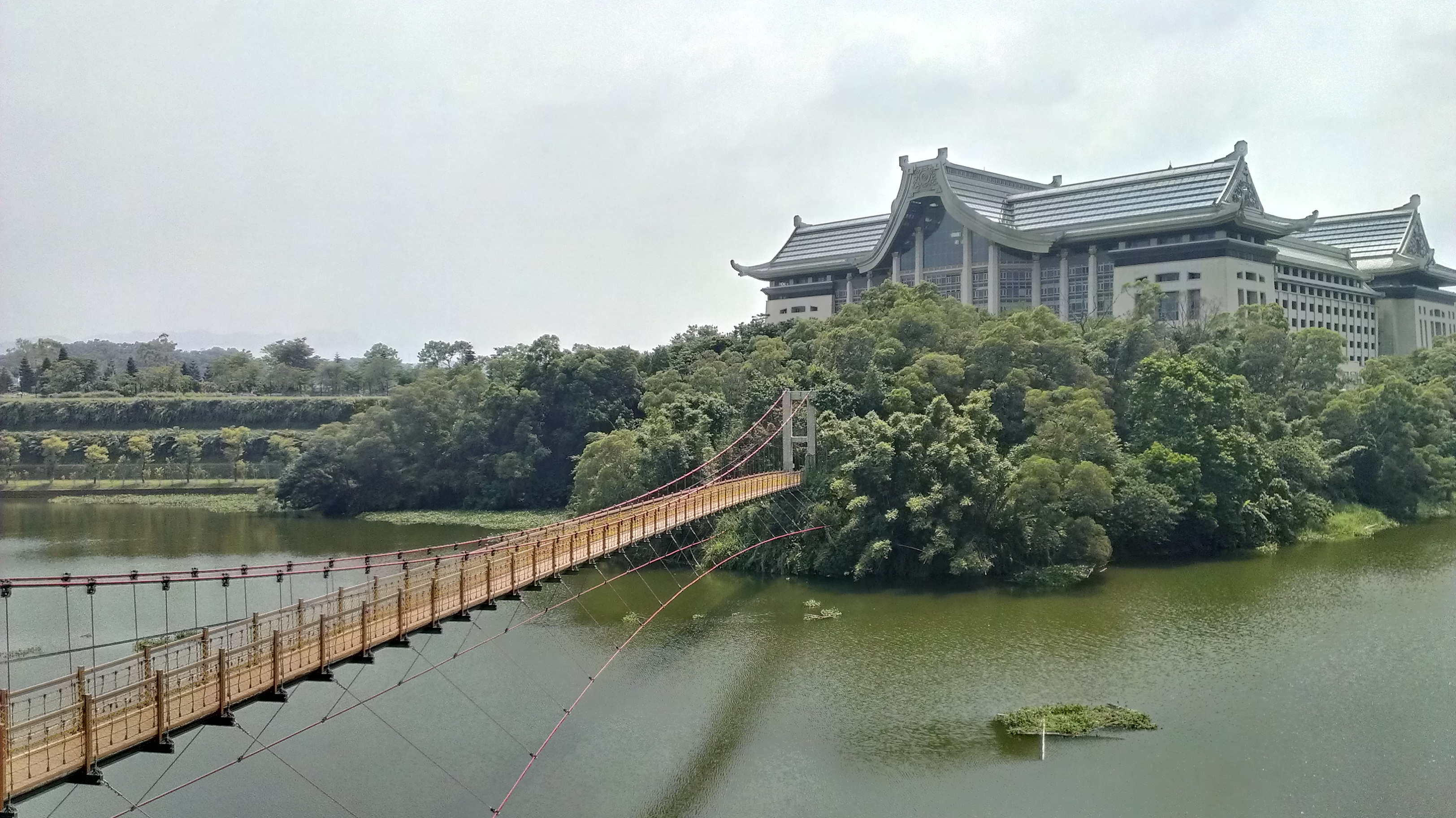 中文（台灣）: 細茅埔吊橋於臺灣新竹縣峨眉鄉大埔水庫(峨嵋湖)，前方為彌勒大道大自然文化世界